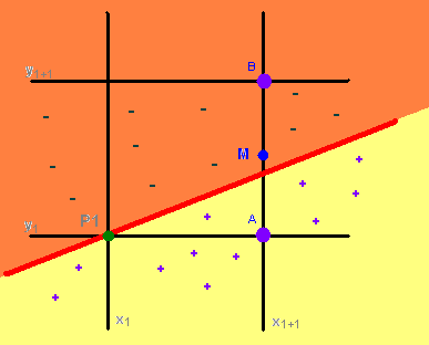 Grafico che mostra l'analisi del segno della forma esplicita dell'equazione della retta. La versione originale del file invertiva il semipiano positivo con quello negativo.